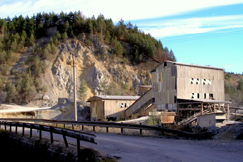 Kameňolom pri Sedliciach